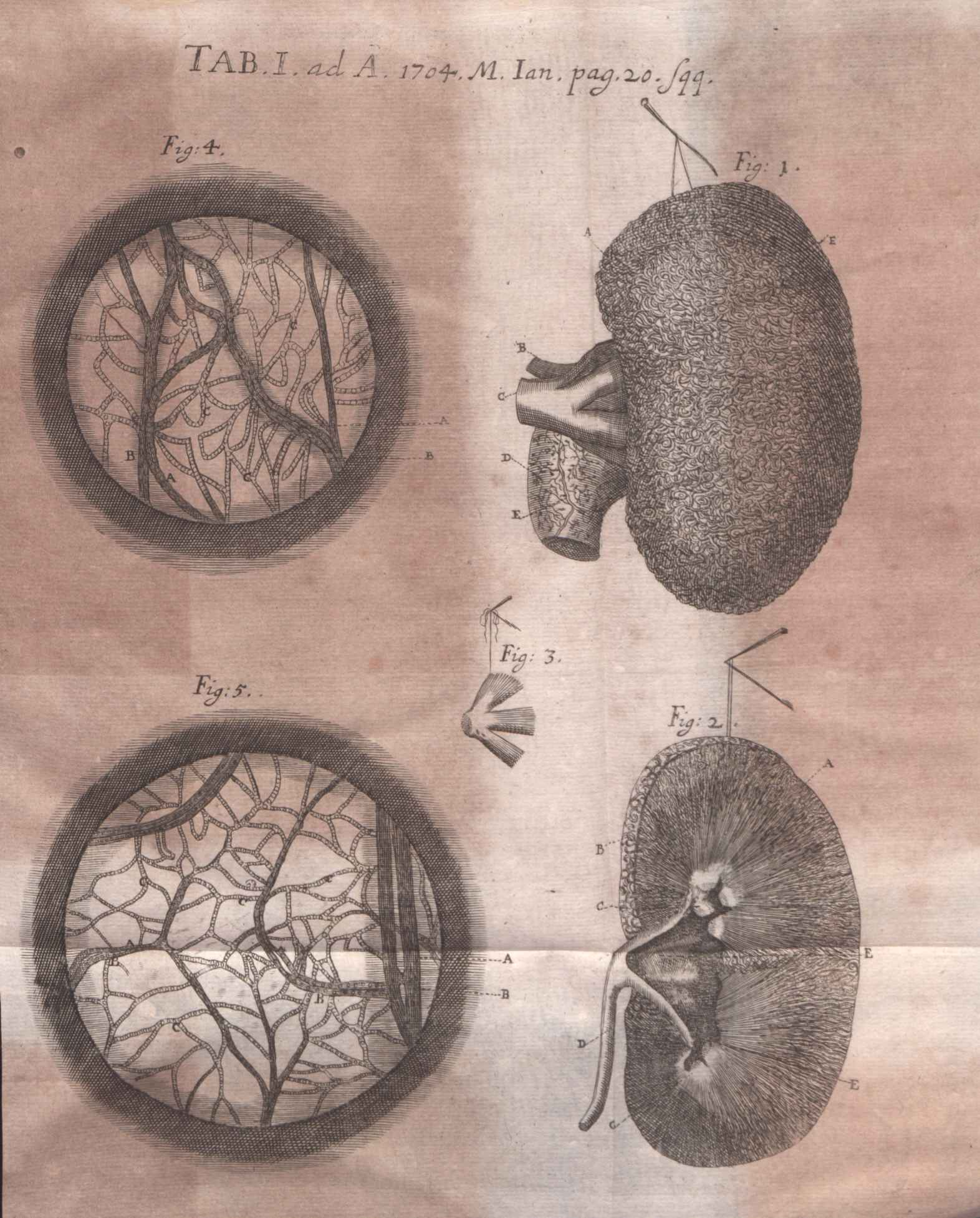 Illustration